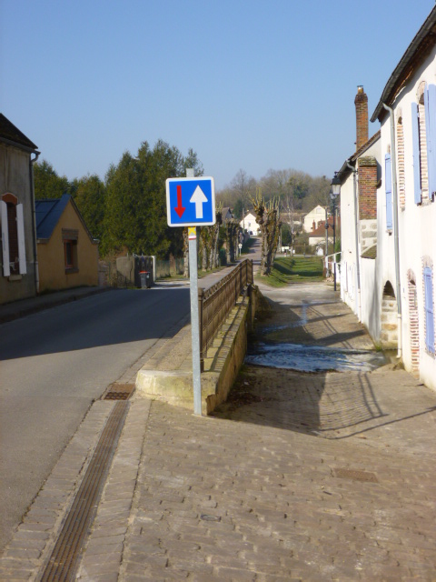 Courtenay, Loiret, Gâtinais, France. La rue des Ponts, empruntée par le GR 132. Vue vers le N-E.